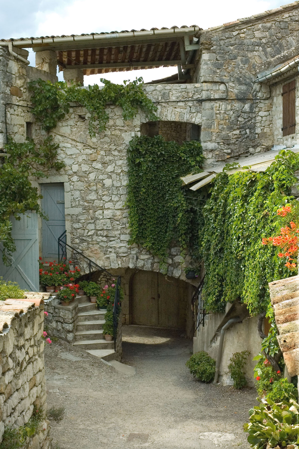 Village typique de l'ardèche méridonale. Balazuc est très touristique, il n'est pas aisé de trouver en plein de coeur de l'aprés-midi des ruelles sans promeneurs. Typical village of Ardeche. Balazuc is very picturesque, it was not easy to find into the full afternoon lanes without walkers.